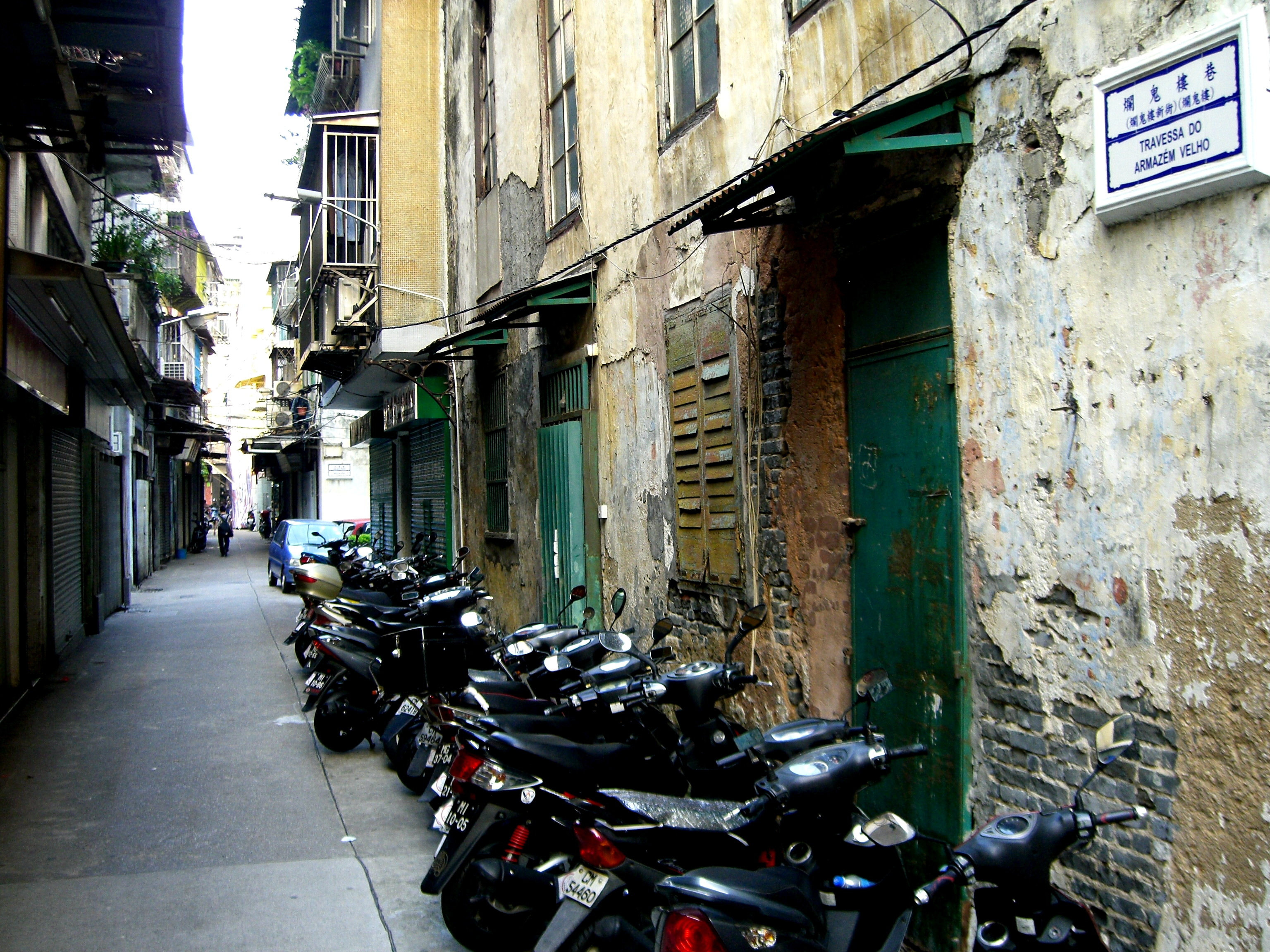 Travessa do Armazém Velho